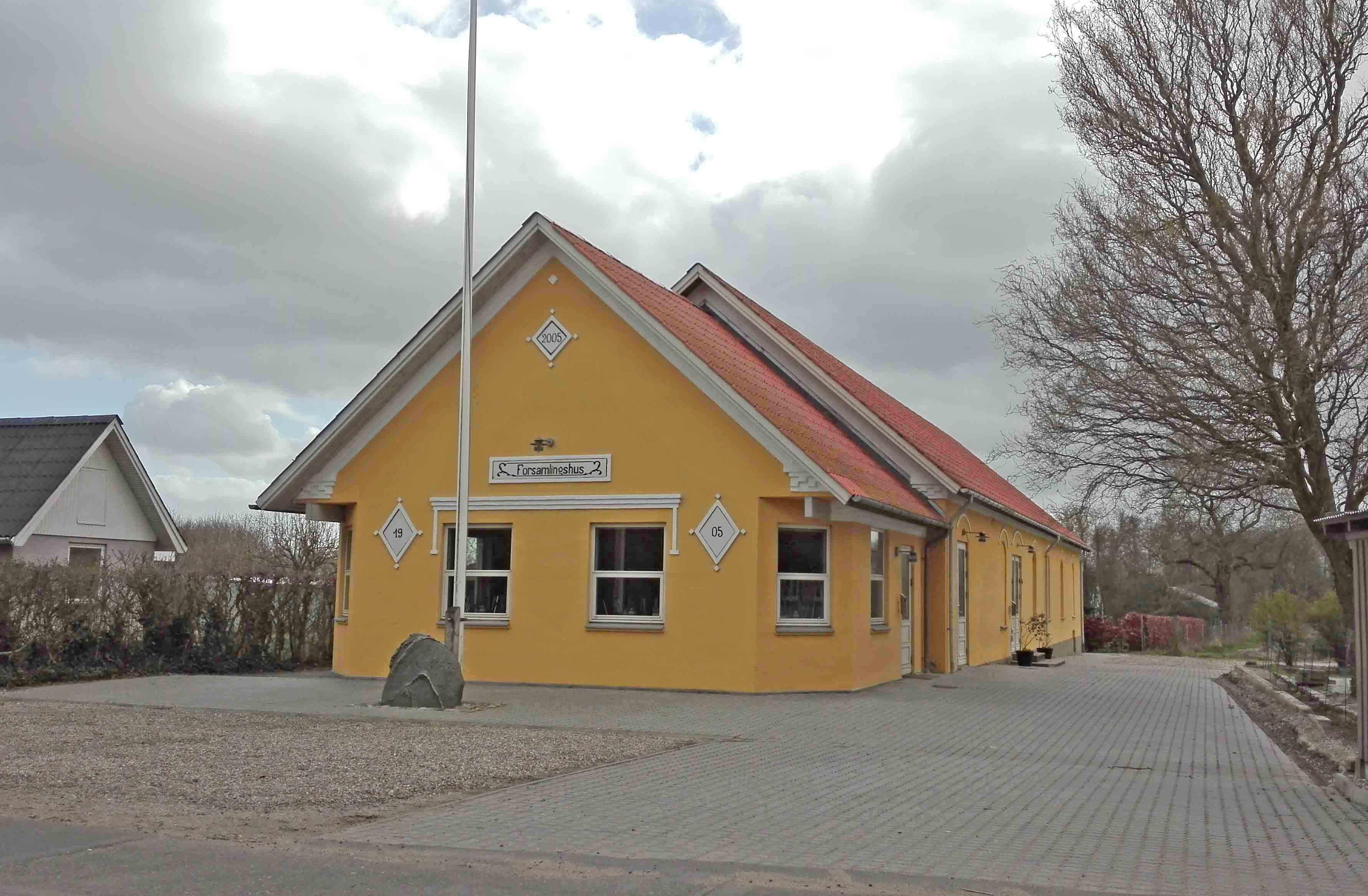 Agedrup Forsamlingshus